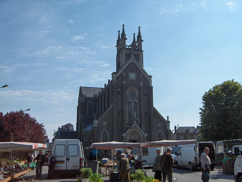 Bihorel Place de l'église Notre Dame des Anges un jour de marché. Photo personnelle de juin 2006